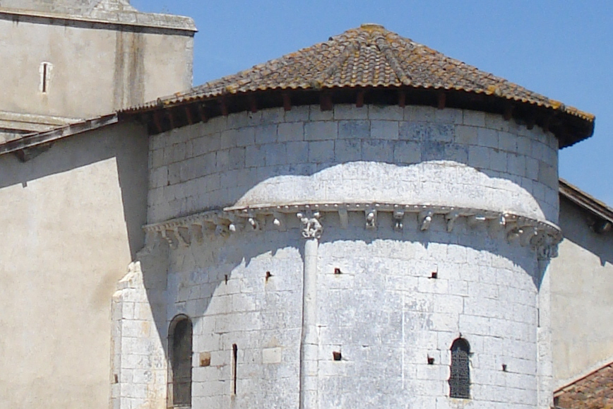 Audignon (Landes,Fr) chevet de l'église